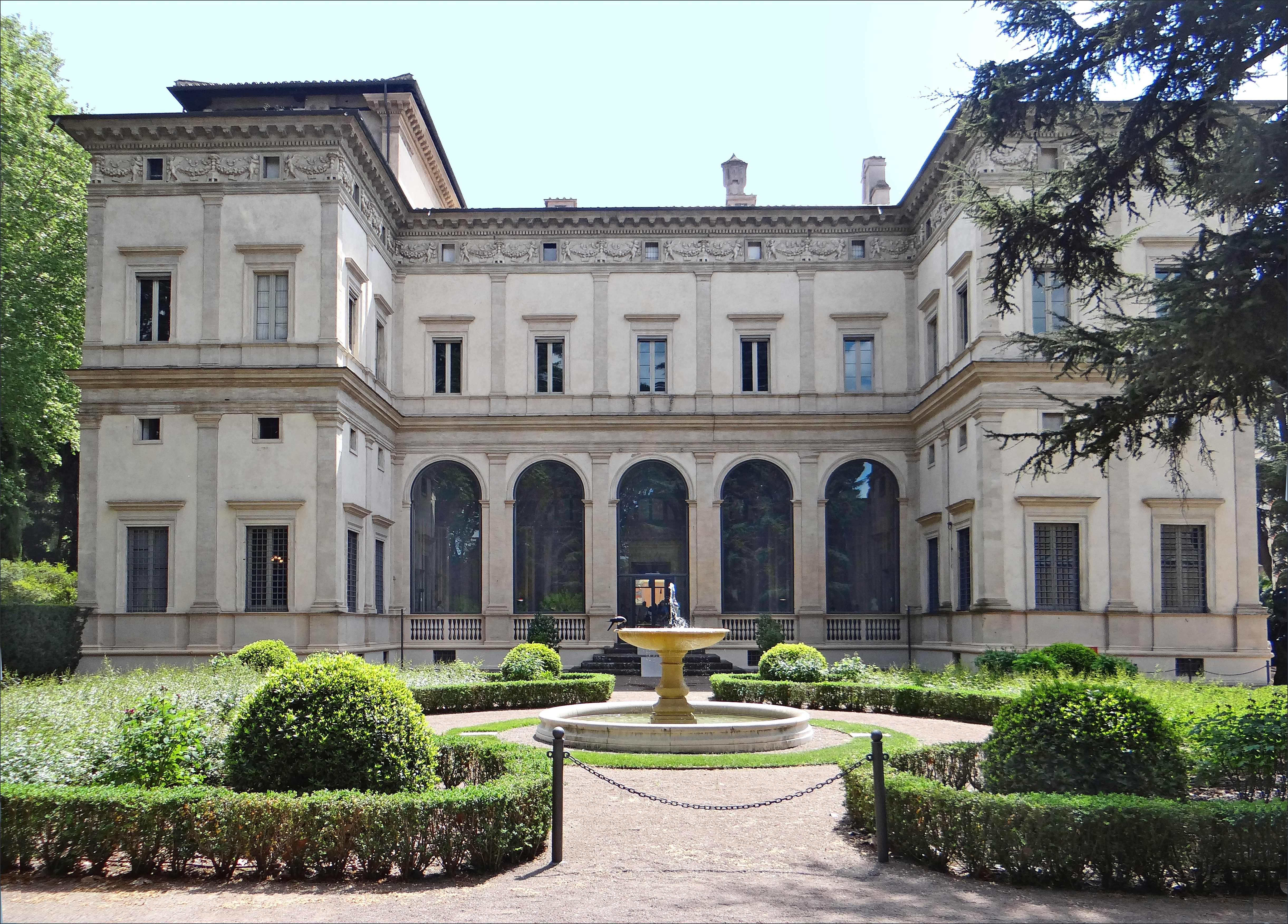 La facade coté jardin de la villa Farnesina La Farnesina est une des plus belles villas romaines de la Renaissance. La fusion entre l'architecture et la décoration picturale y est particulièrement réussie. Site officiel de la Farnesina